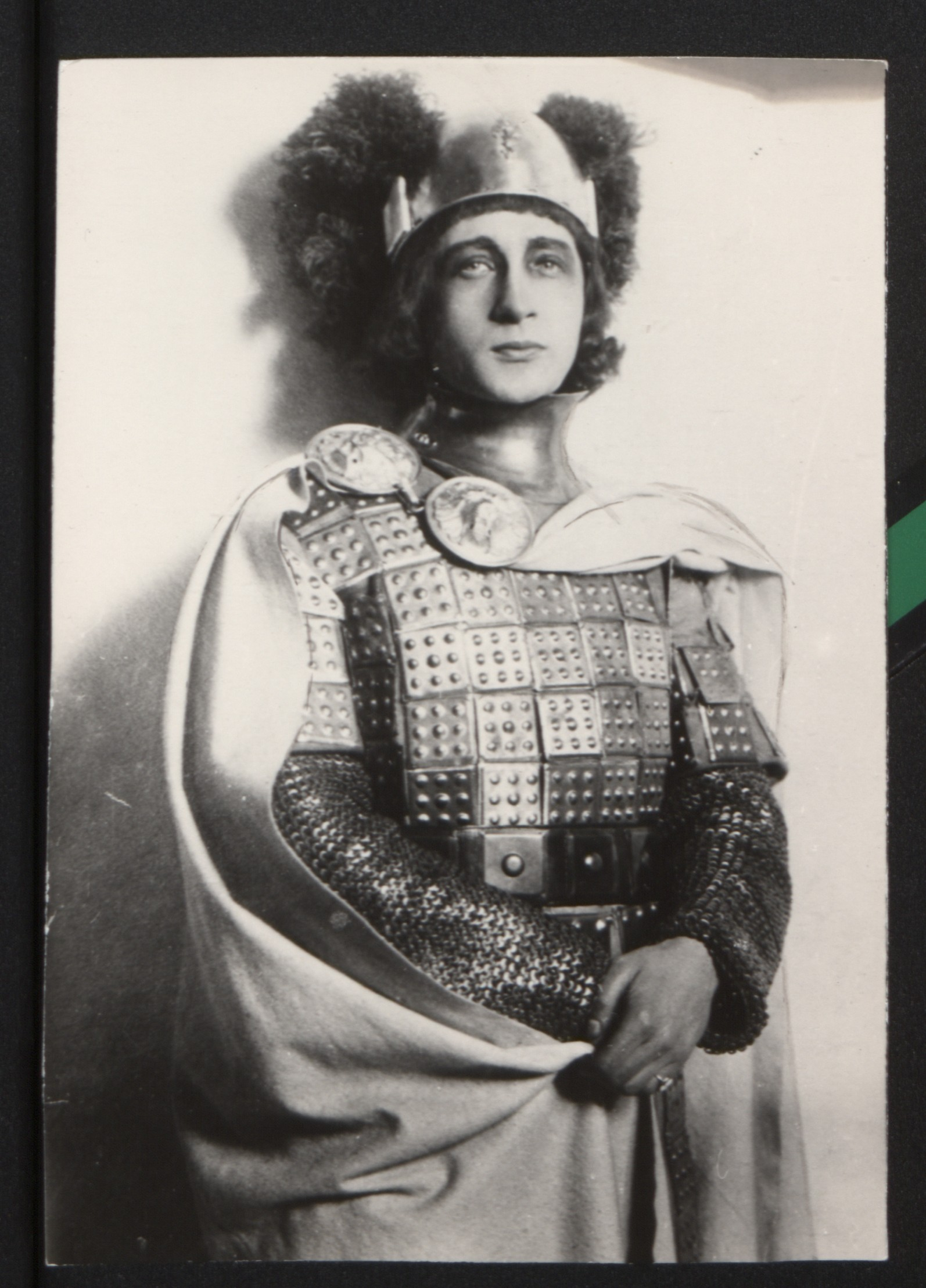 Aktor Aleksander Węgierko jako Don Henryk w spektaklu "Książę Niezłomny" Juliusza Słowackiego według Pedra Calderóna de la Barca, 1918 r.